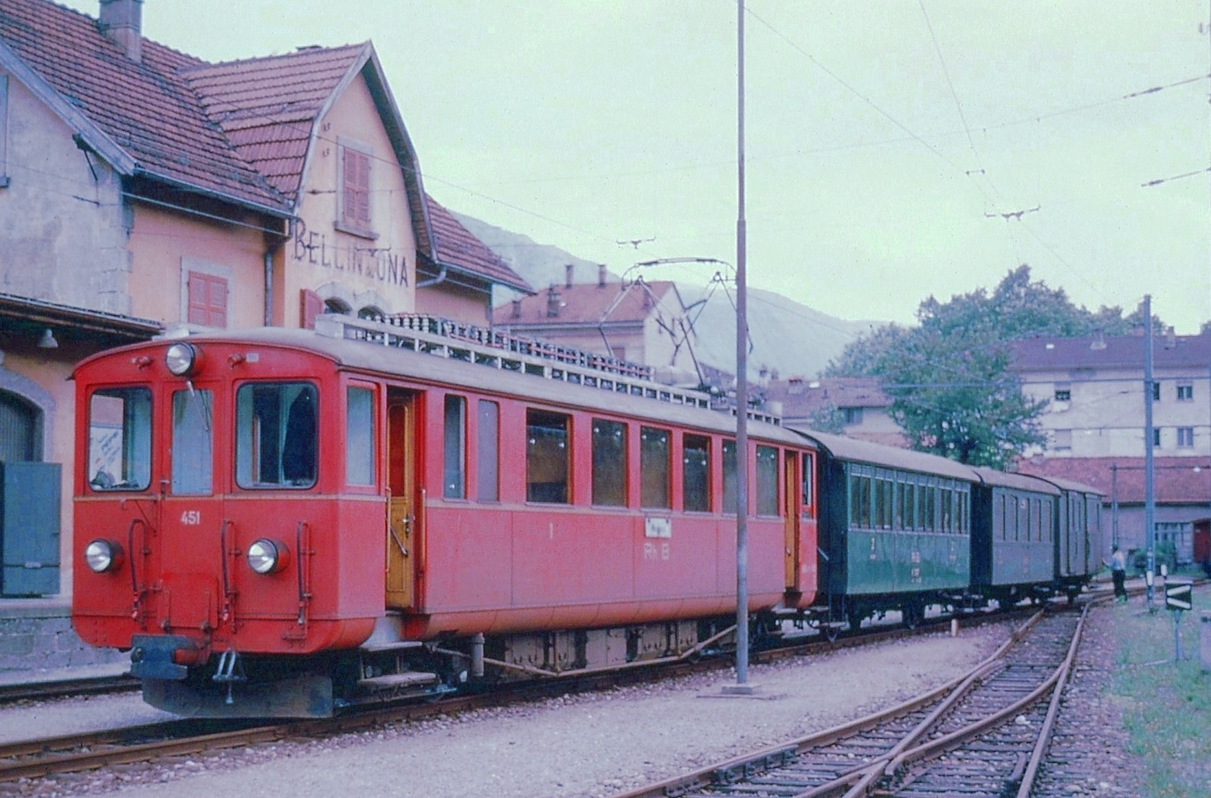 Stazione ferroviaria di Bellinzona della RhB (linea per Mesocco)